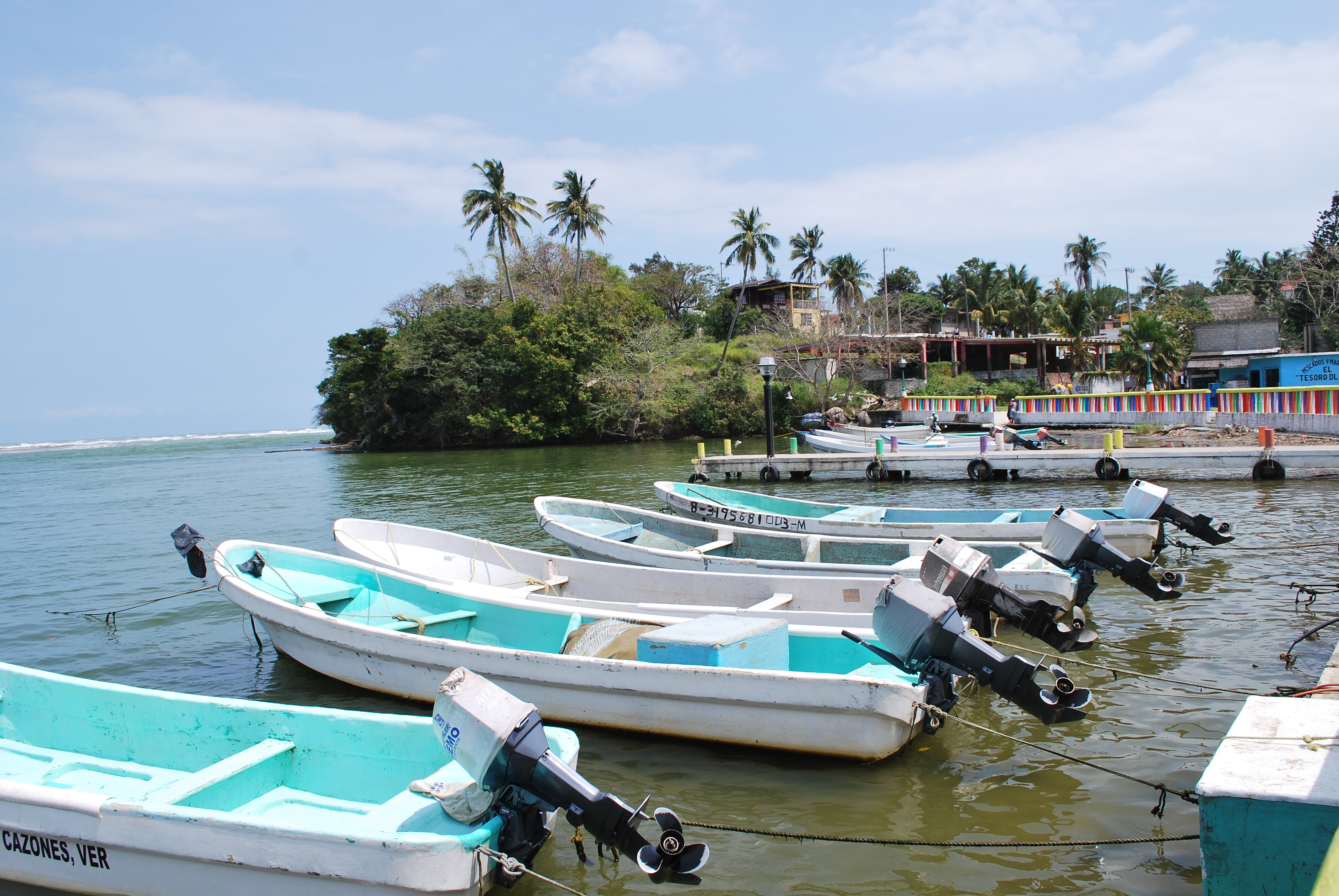 View of the main docks of Barra de Cazones, Veracruz